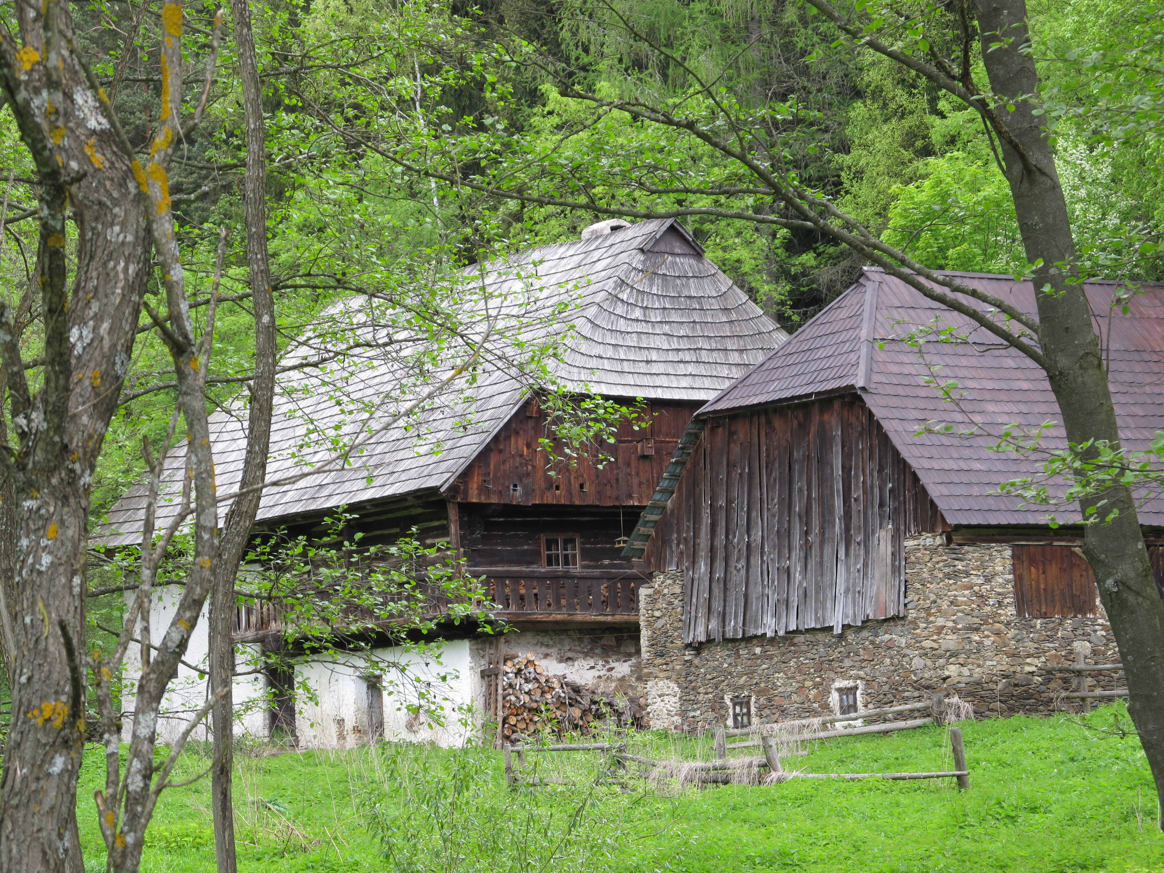 Vodní mlýn Sterzmühle (Mochov), na samotě v Pekelském údolí 10, Mochov